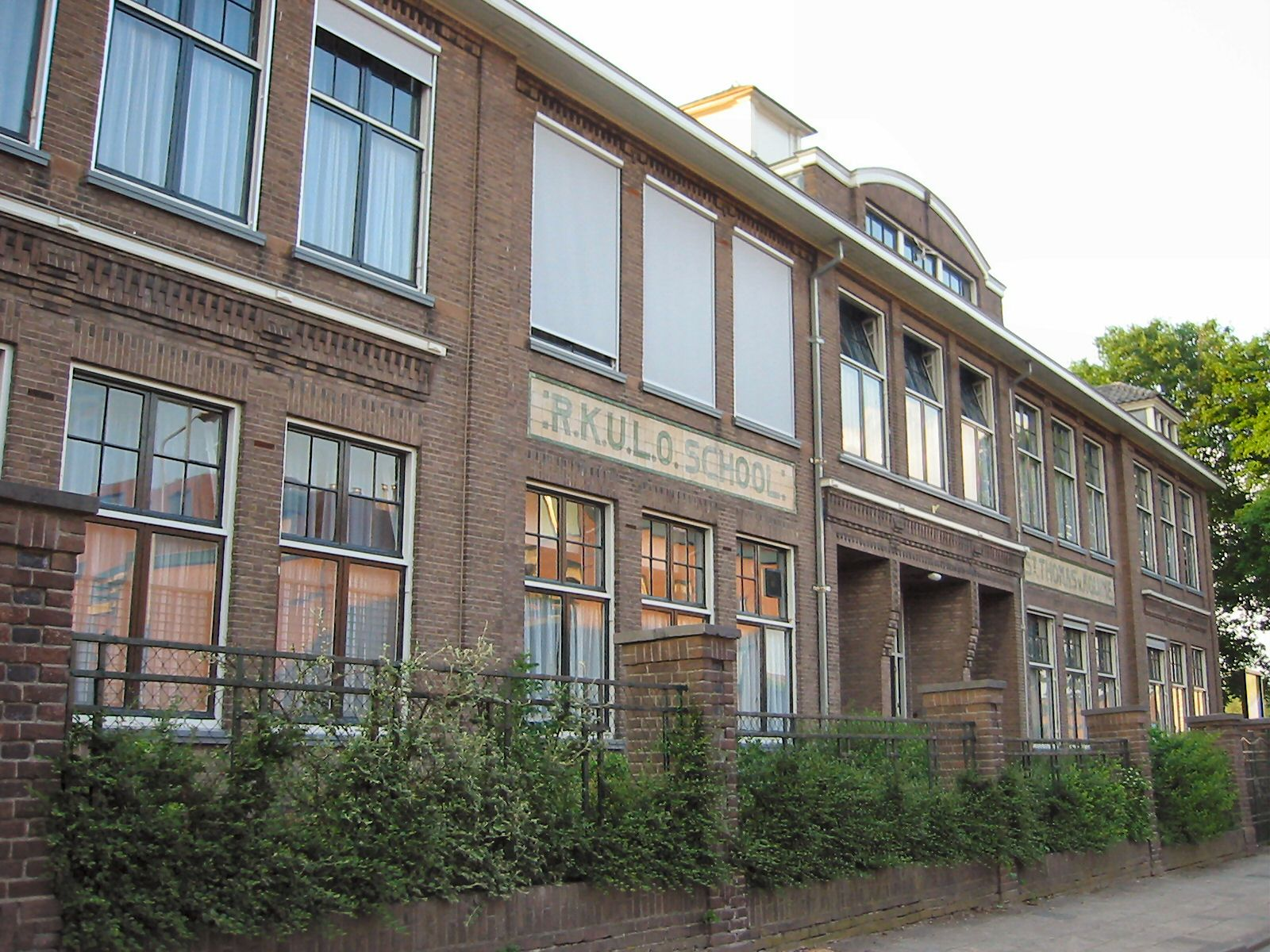 Voormalige Rooms Katholieke ULO St Thomas van Acquino in Tiel